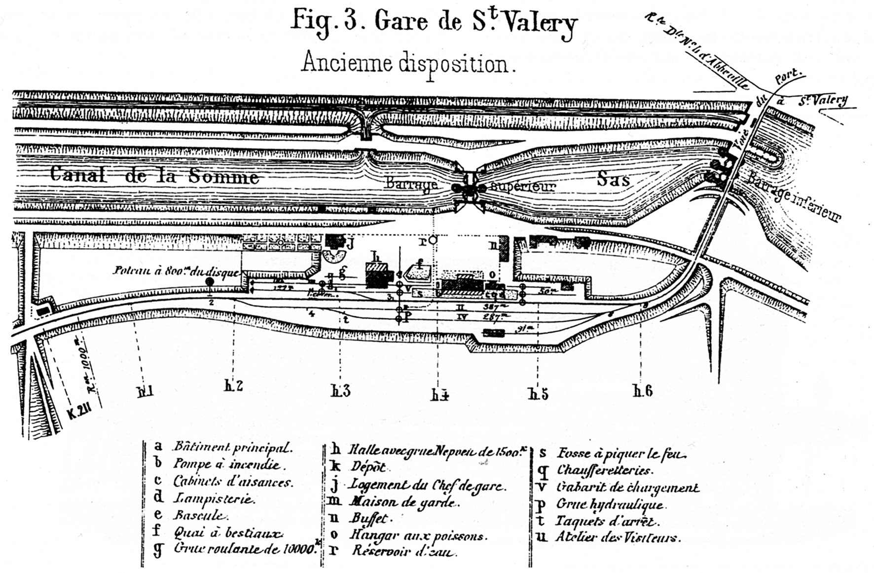 Plan de l'ancienne configuration de la gare de Saint-Valery, imprimée en 1888, après la transformation pour l'arrivée de la voie à quatre fils de rail réalisée en 1887.